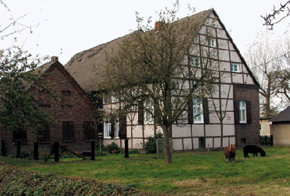 Hof Schulte-Übbing, früher Middendorf: Geburtshaus von Wilhelm Middendorf, der gemeinsam mit Fröbel die ersten Kindergärten in Thüringen gründete.